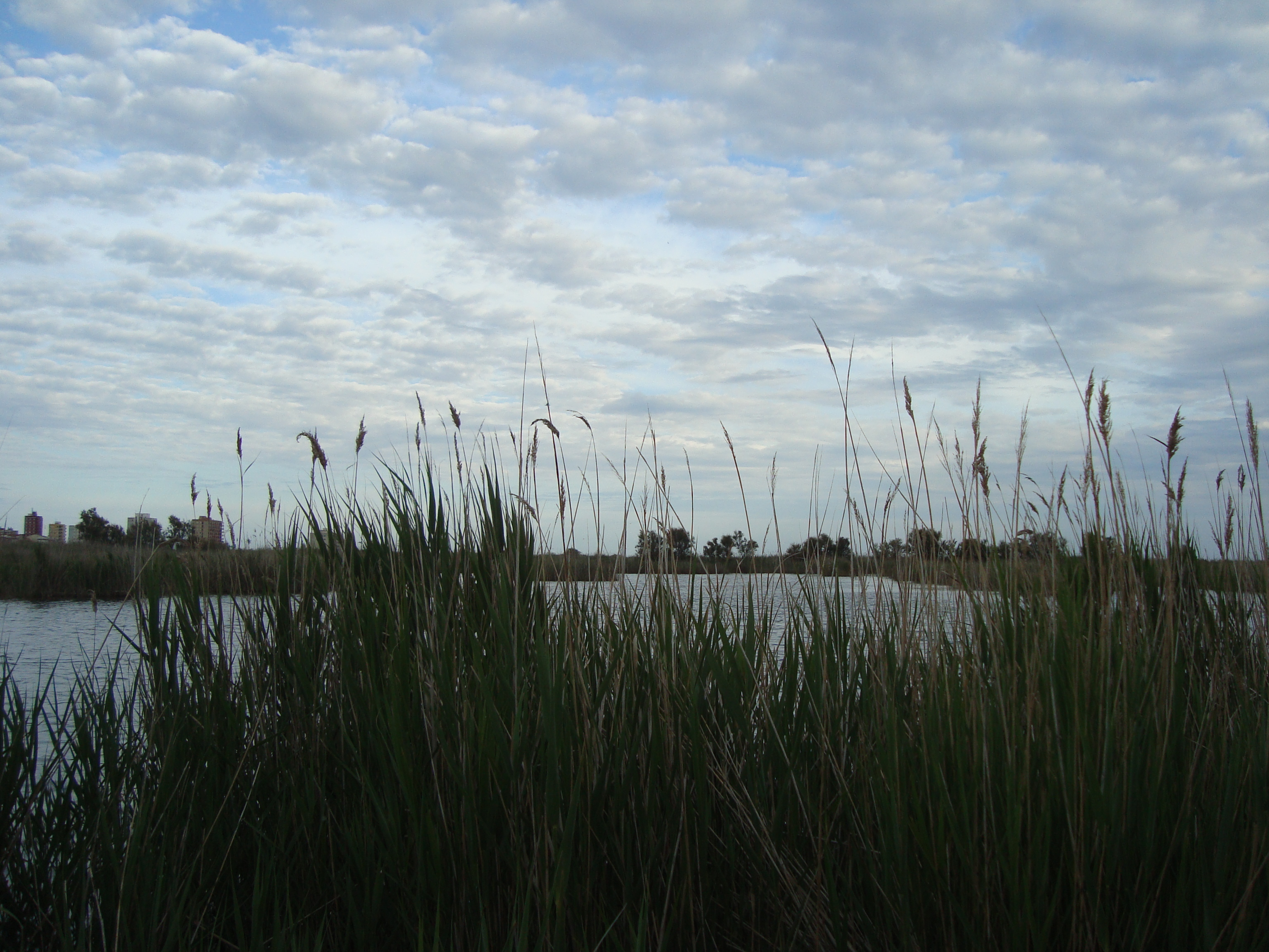 Paraje Natural del Prat de Cabanes-Torreblanca (Castellón, Comunidad Valenciana, España)